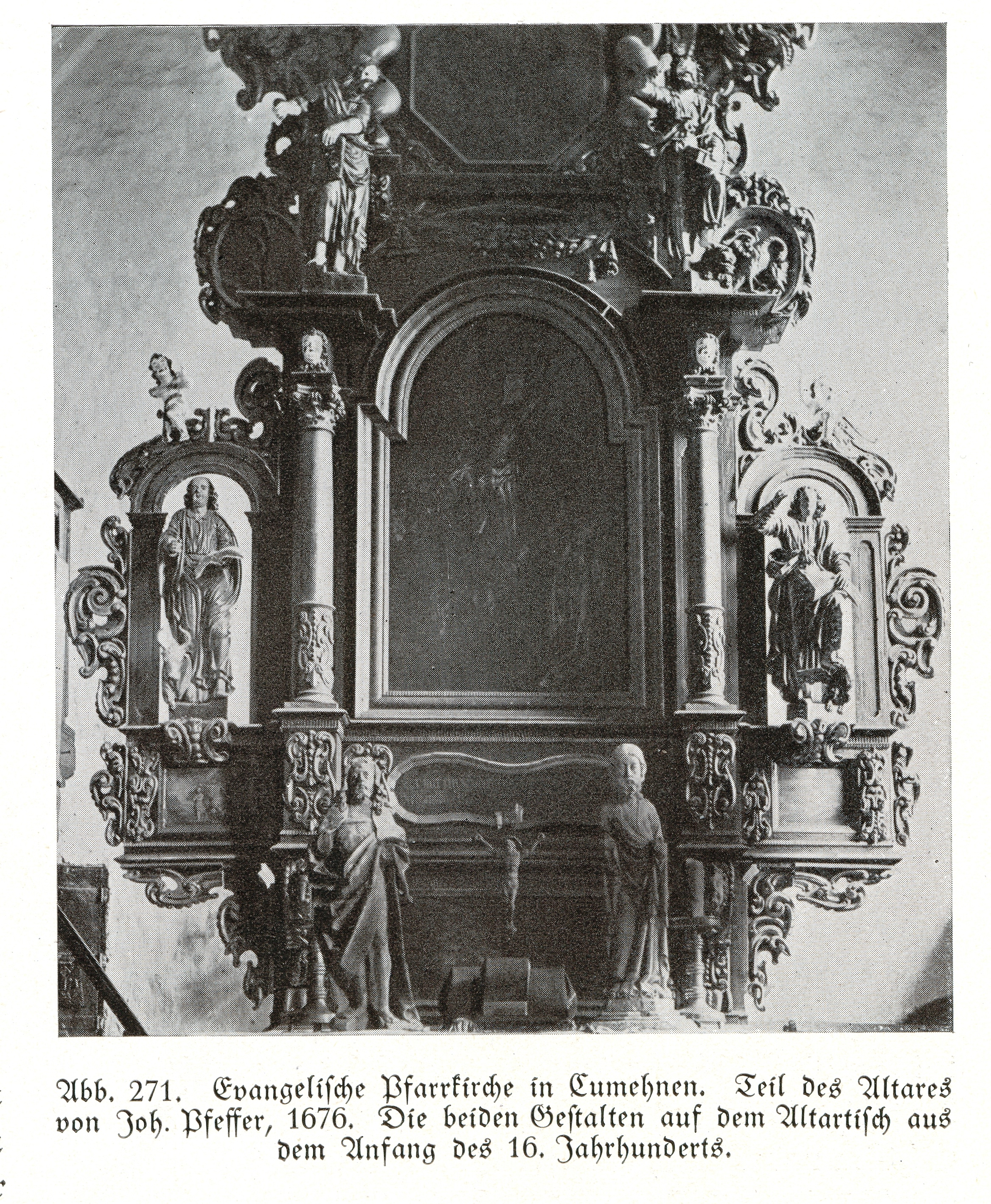 Cumehnen, evangelische Pfarrkirche, Altar von Joh. Pfeffer, 1676, Detail